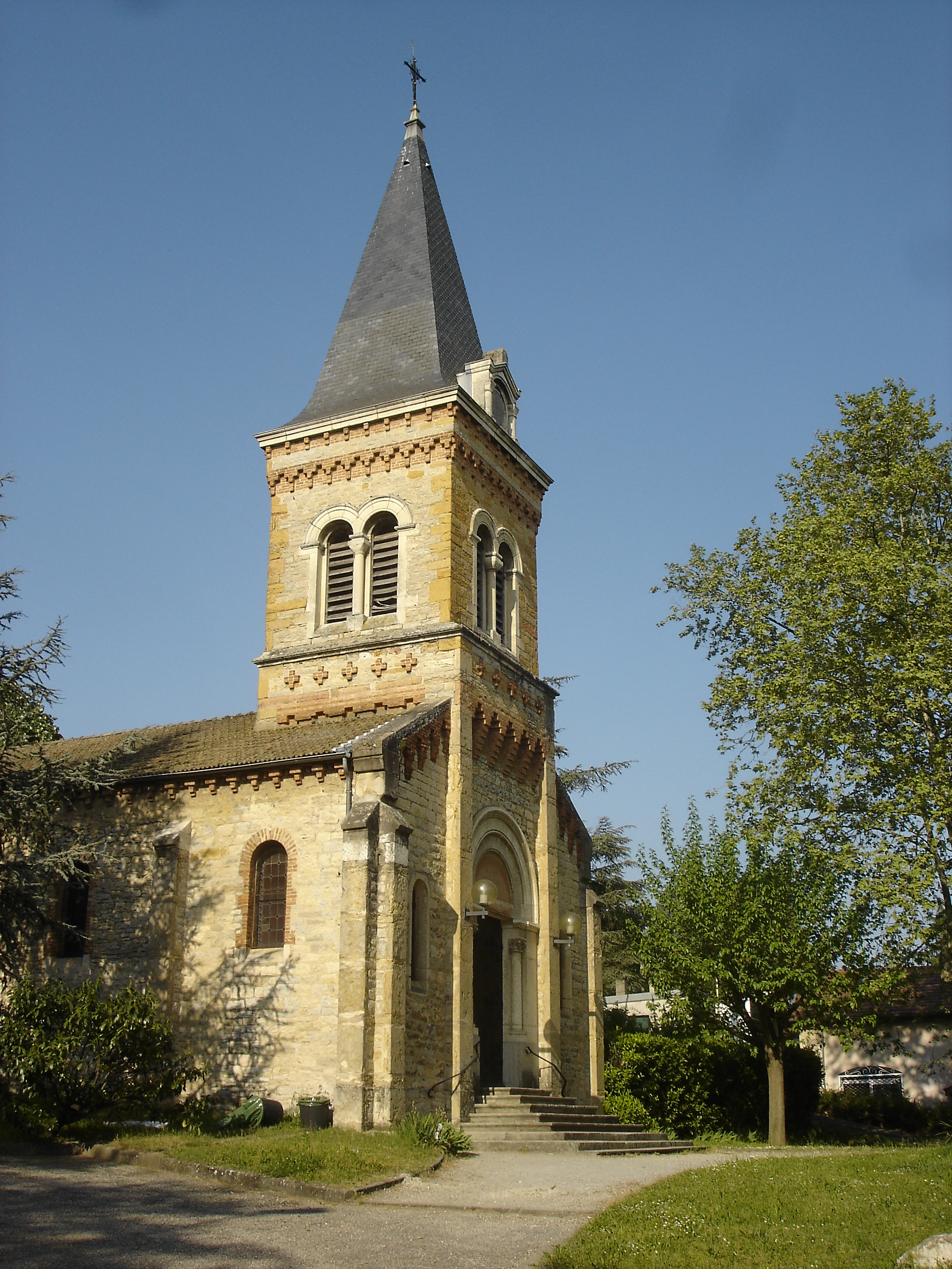 Église Saint-Jean-Marie-Vianney à Crépieux-la-Pape (Rillieux-La-Pape) dans le département du Rhône en France.